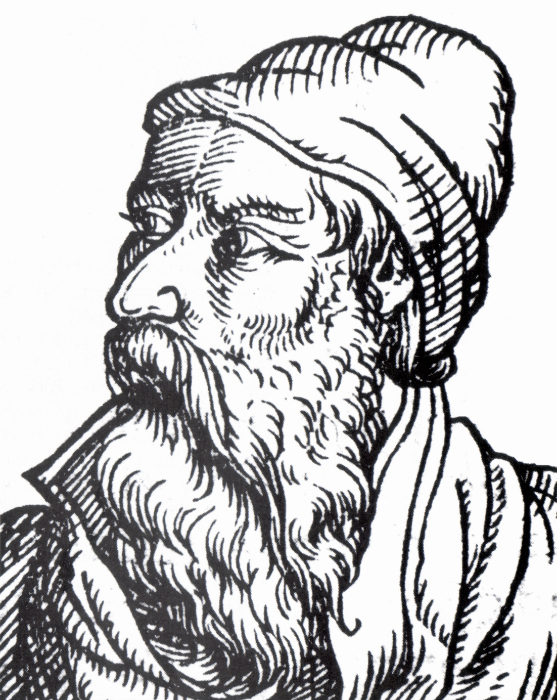 Hiob Magdeburg deutscher Humanist. Darstellung aus Heinrich Pantaleons Prosoprographiae herorum, 1565/66